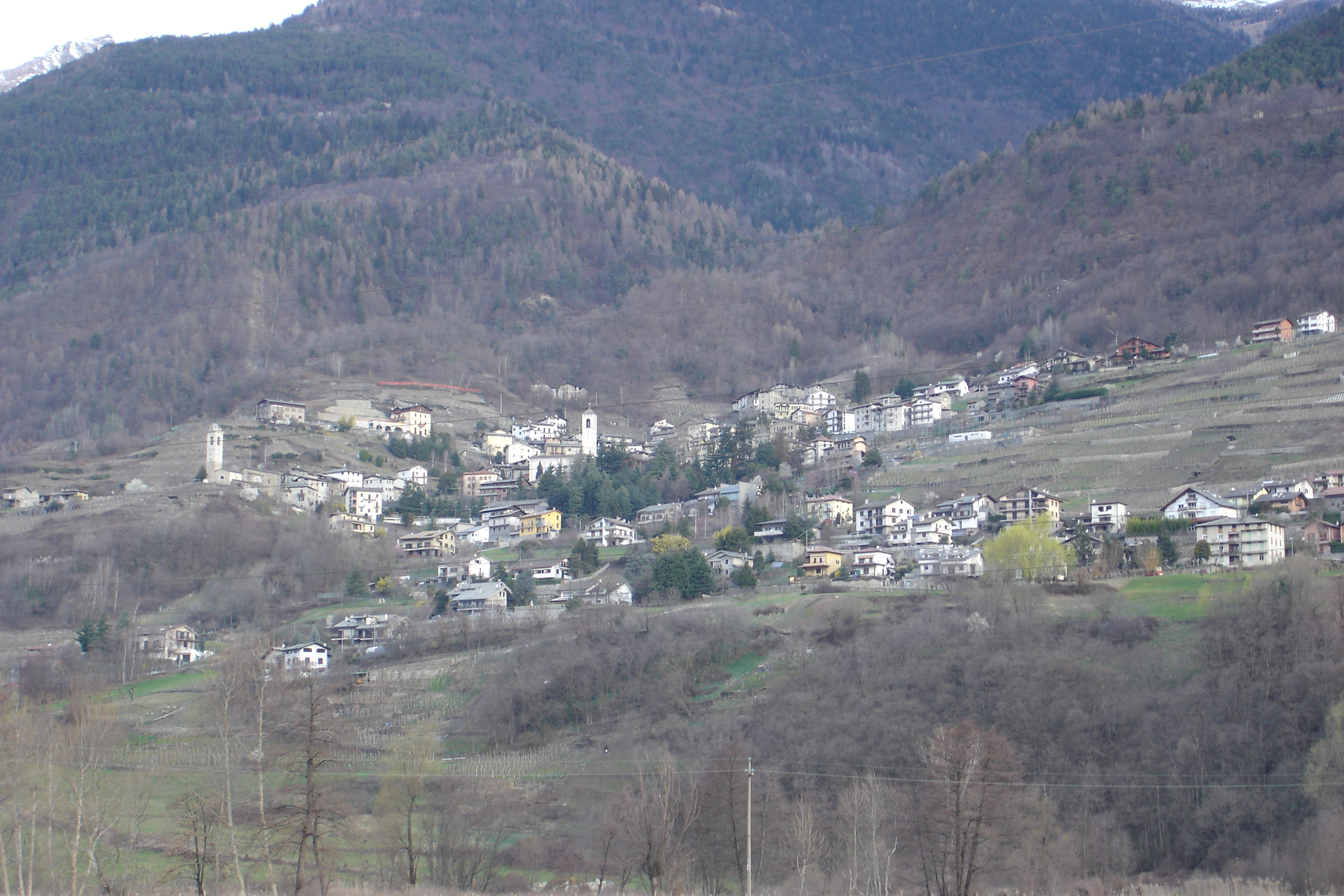 immagine di Castione Andevenno